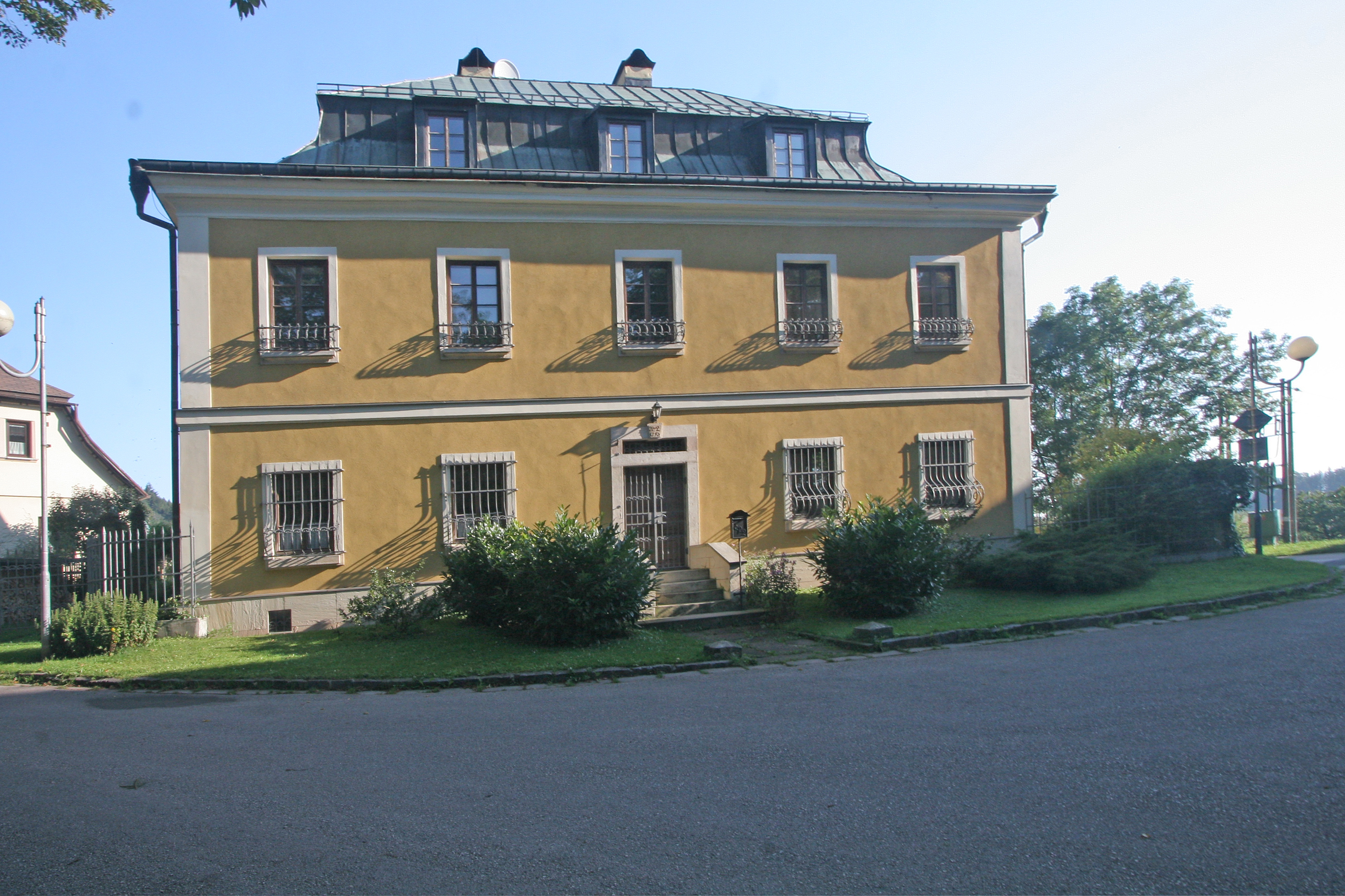 Fara, J. E. Purkyně 2, Žacléř.